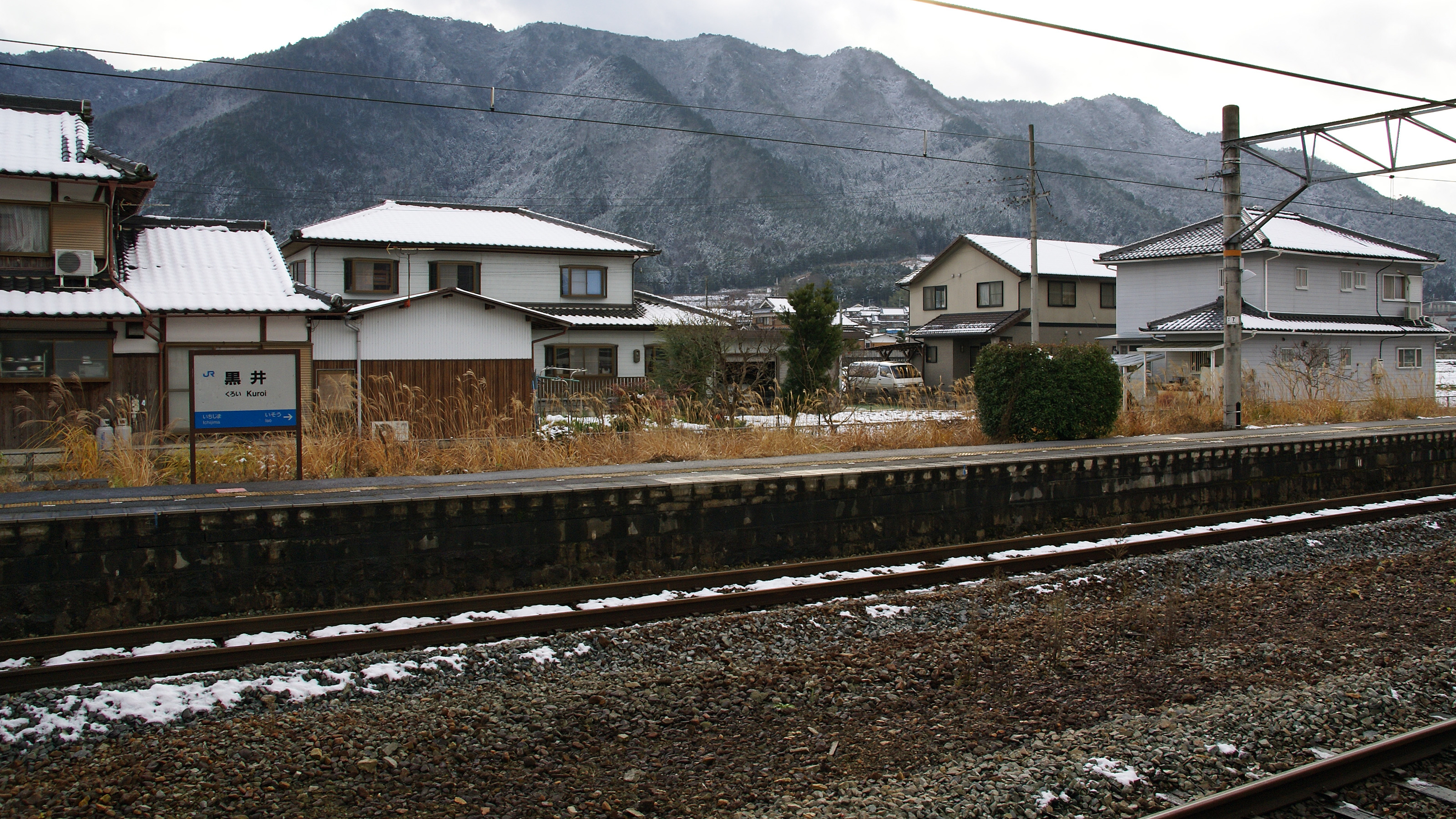 Kuroi Station in Tamba, Hyogo, Japan